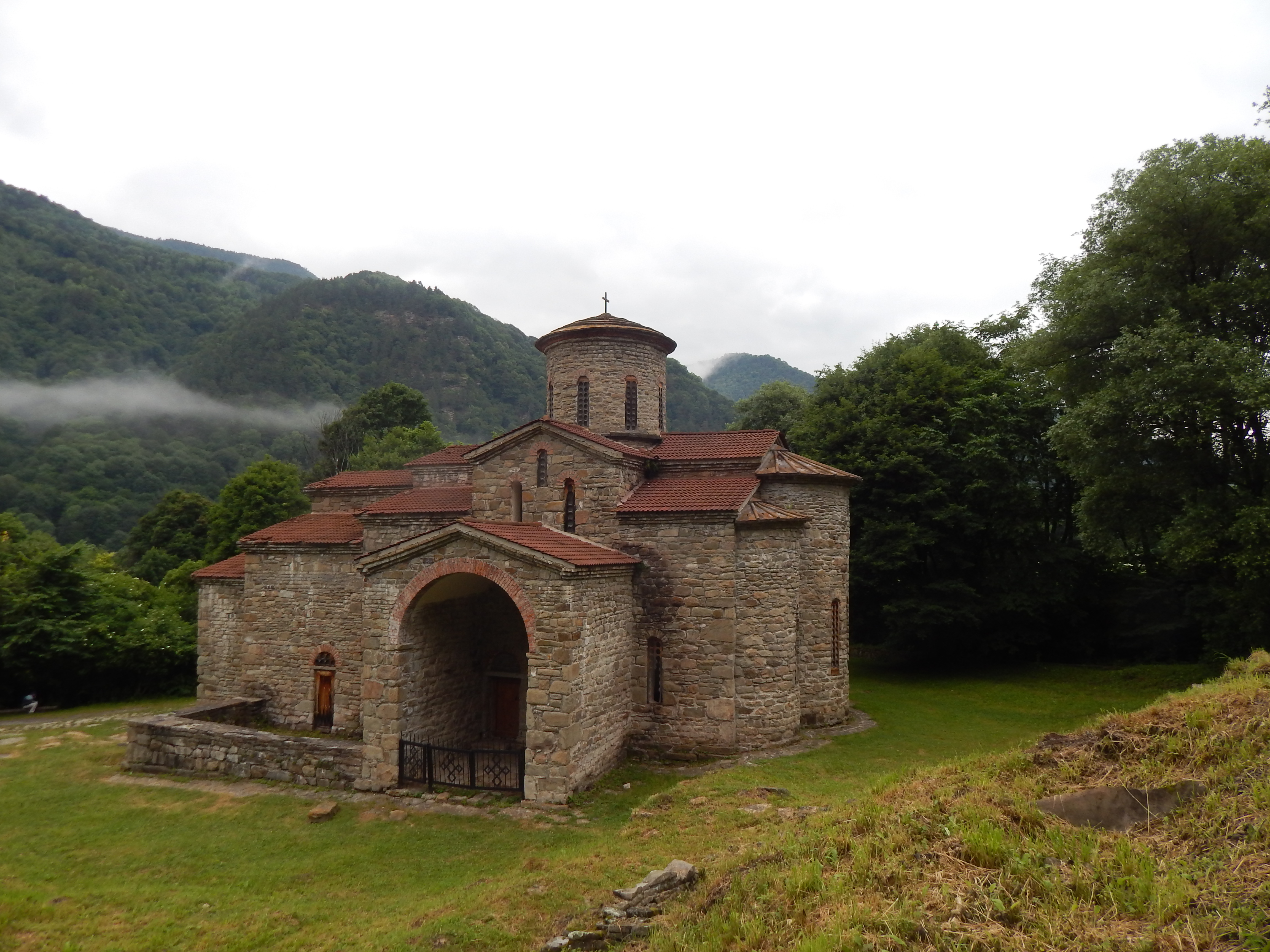 Нижне-Архызское городище. Северный храм. Вид с руин архиерейского дома.